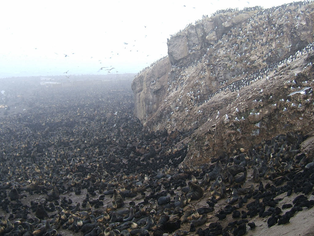 Tyuleniy Island, Sakhalin, Russia